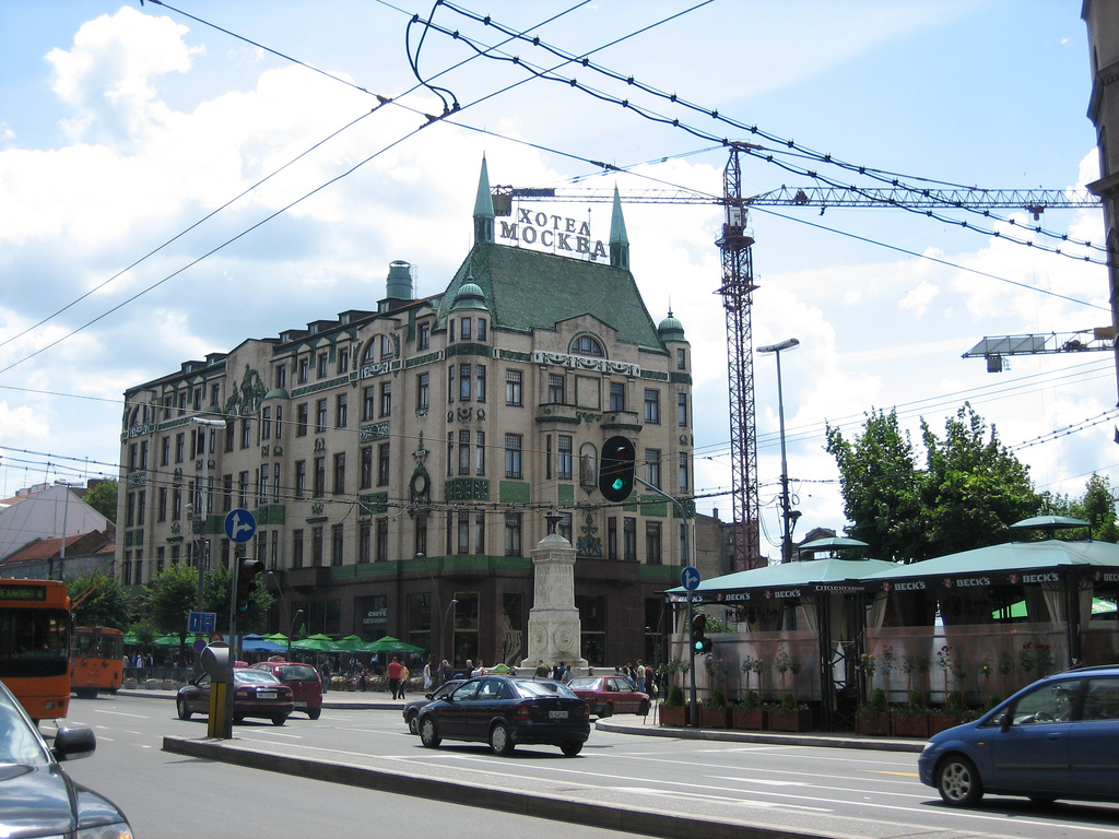 Hotel Moscou à Belgrade, Serbie